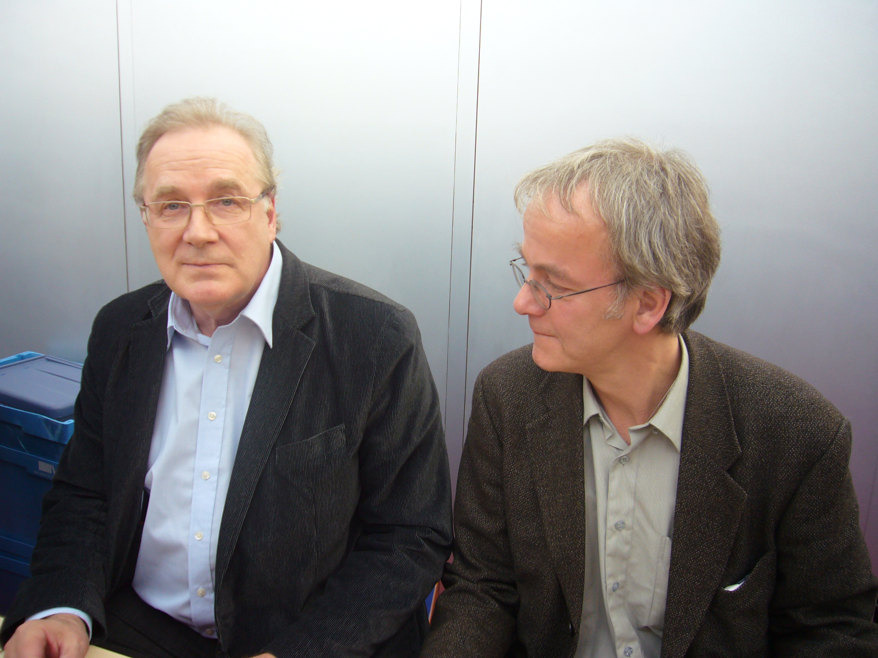 Sten Nadolny + Jens Sparschuh beim Blauen Sofa